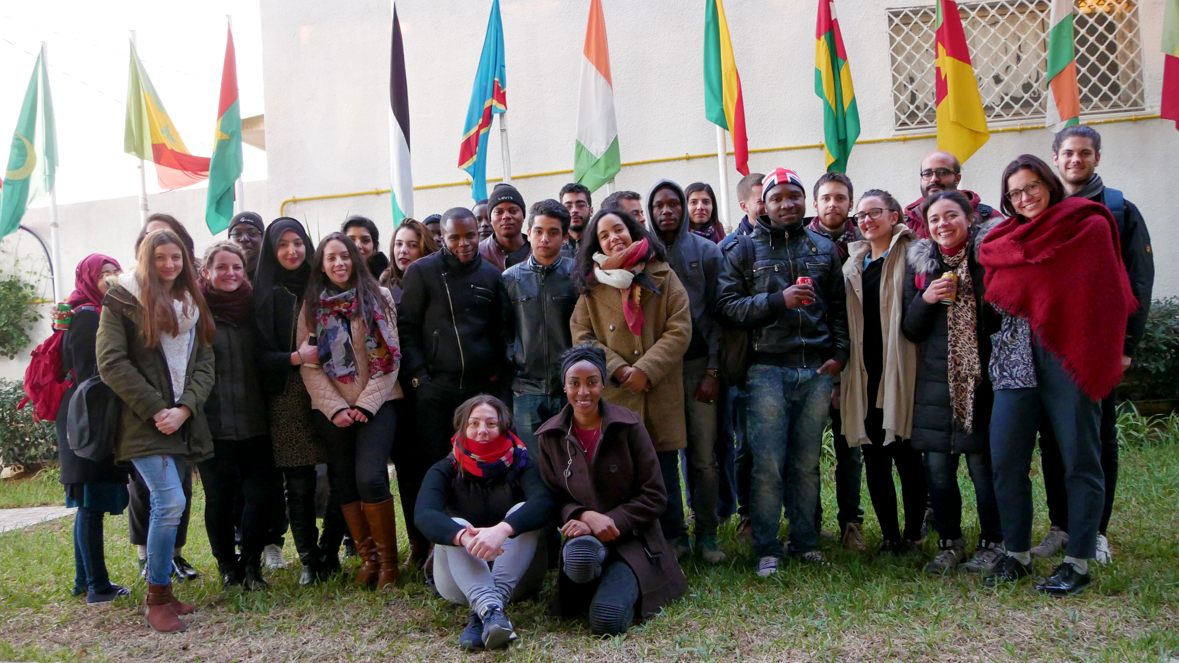 Cérémonie organisée pour acceuillir des étudiants de douze nationalités: Algérie, Allemagne, Equateur, Etats-Unis, France, Grèce, Italie, Maroc, Suisse, Tunisie, Turquie et Ukraine